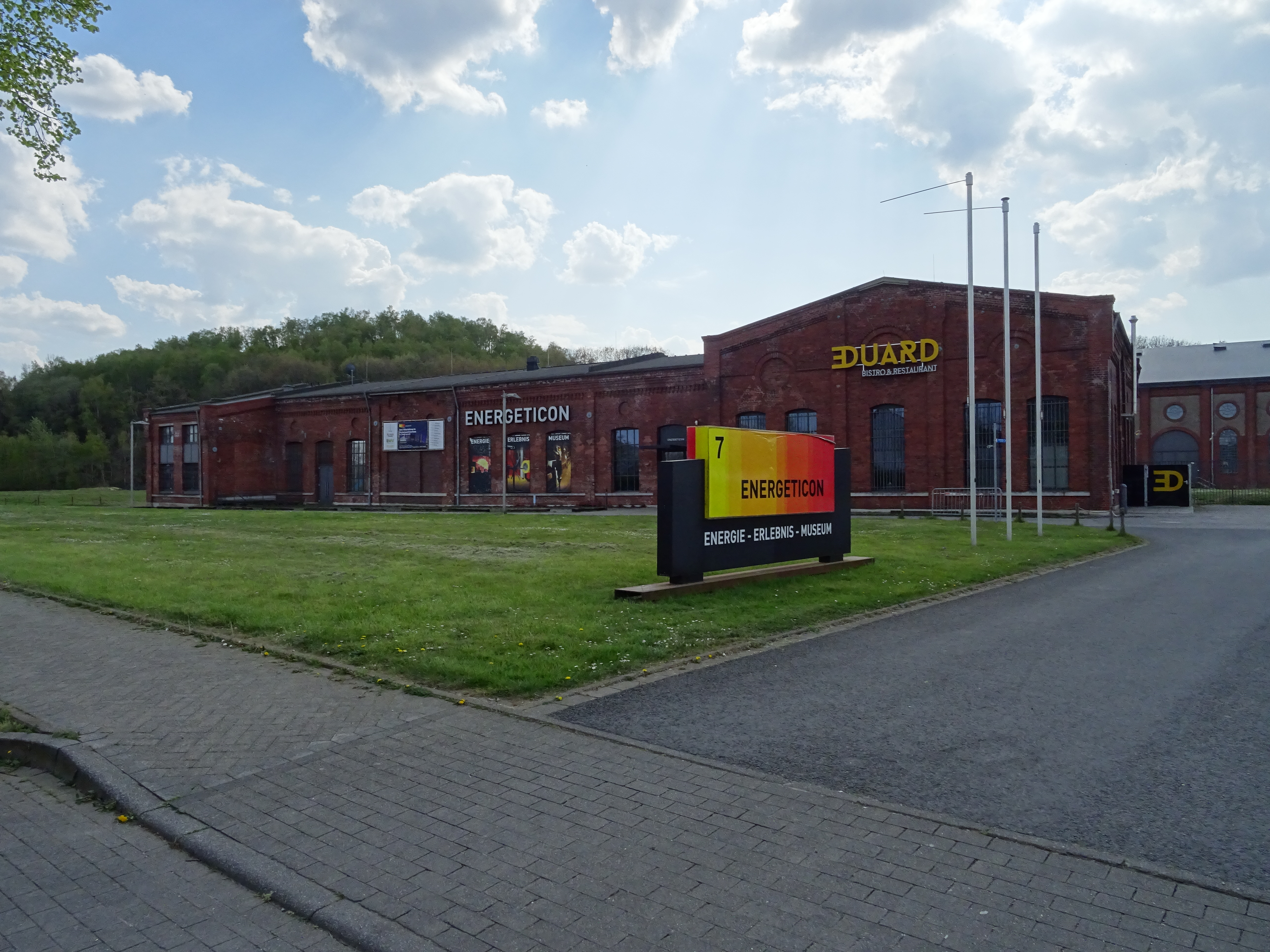 Ehemalige Schmiede Grube Anna II, heutiges Energeticon